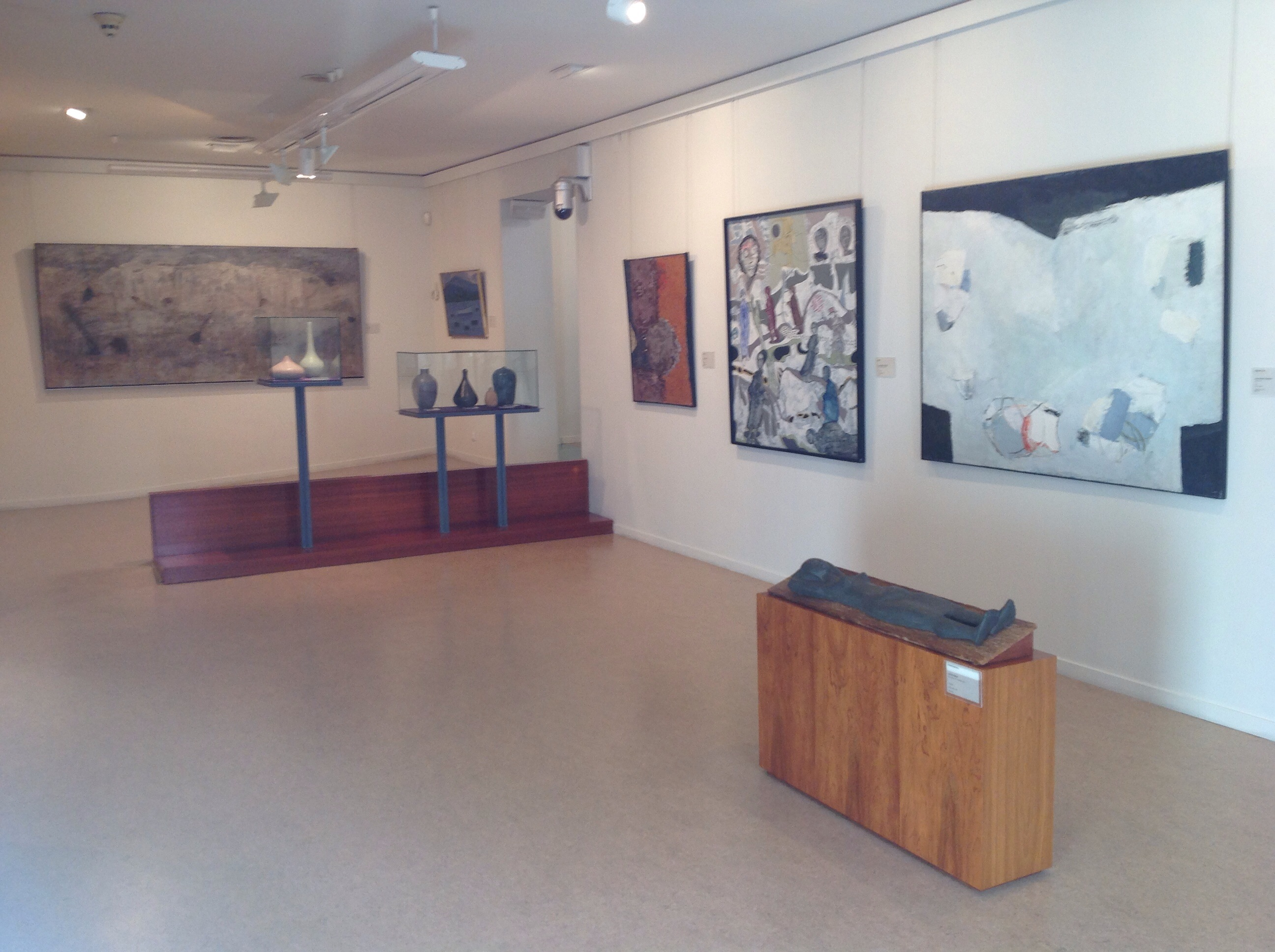 interiors Biblioteca Museu Víctor Balguer febrer 2015